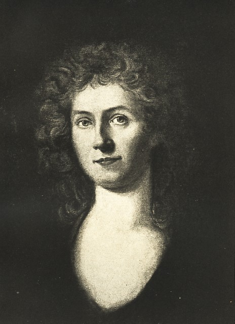 Selbstportrait der Schauspielerin und Sängerin Corona Schröter.